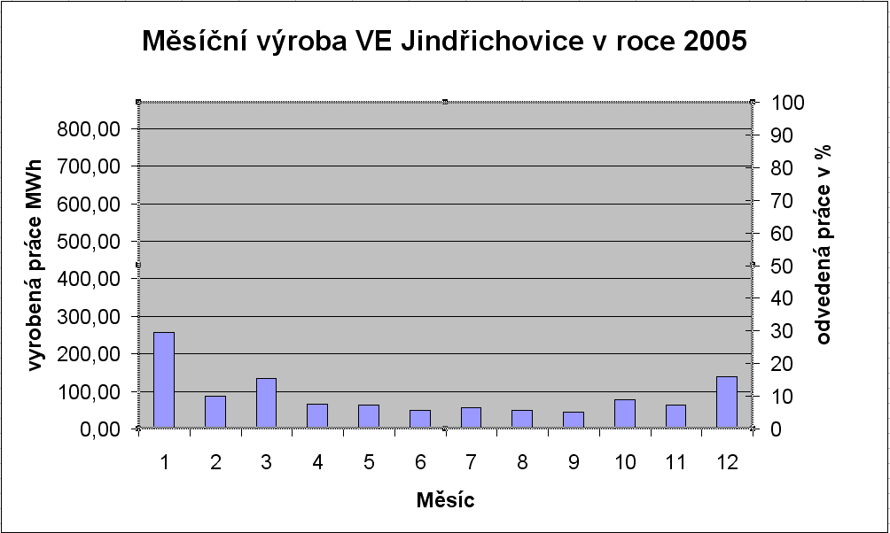 Měsíční výroba větrné farmy Jindřichovice v roce 2005 v absolutní a procentní hodnotě.